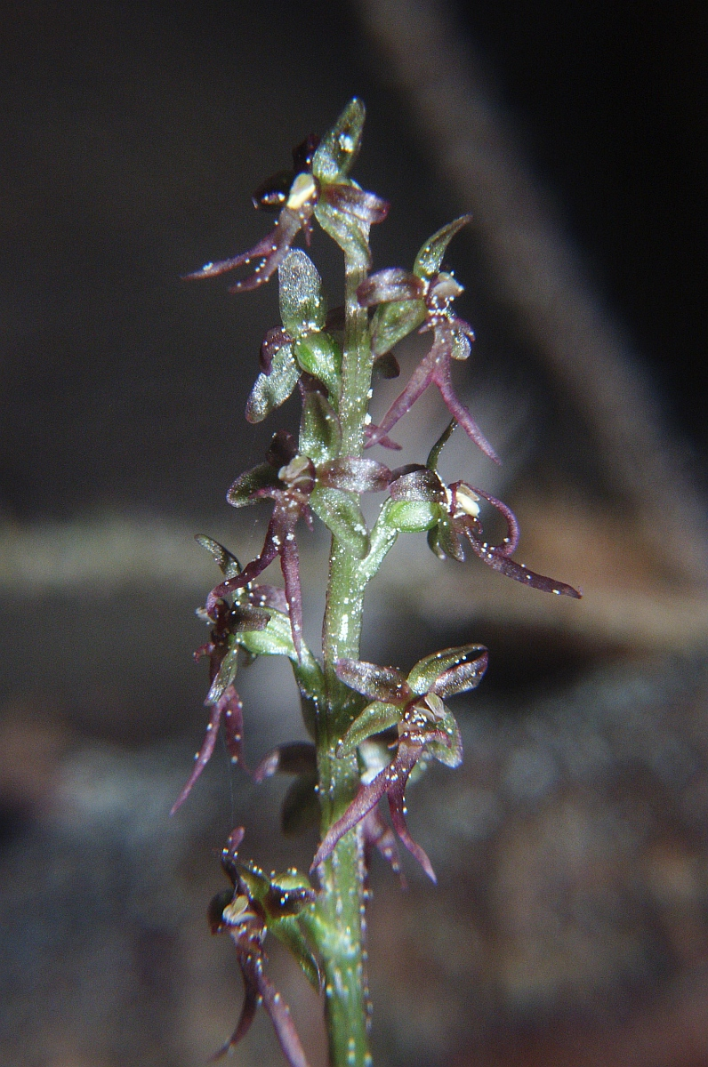 Listera cordata, nördlicher Schwarzwald, Germany